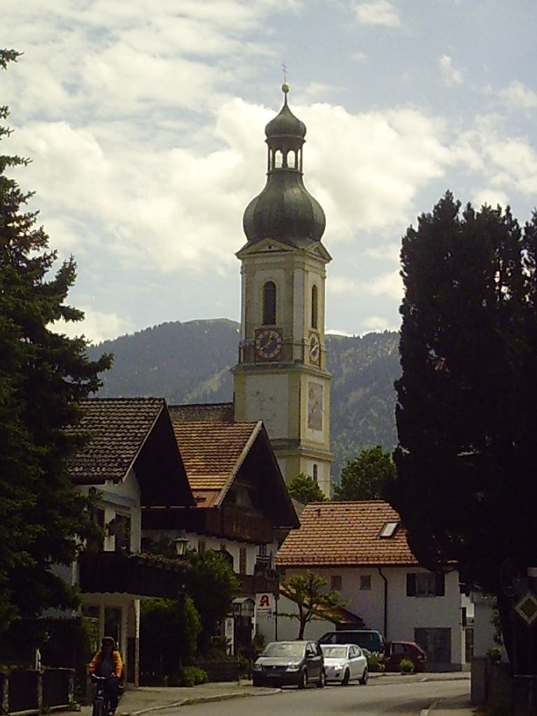 Lenggries